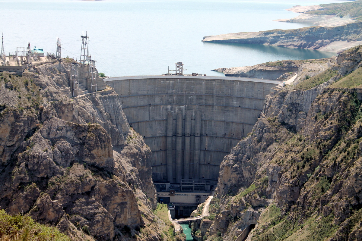 Чиркейская ГЭС